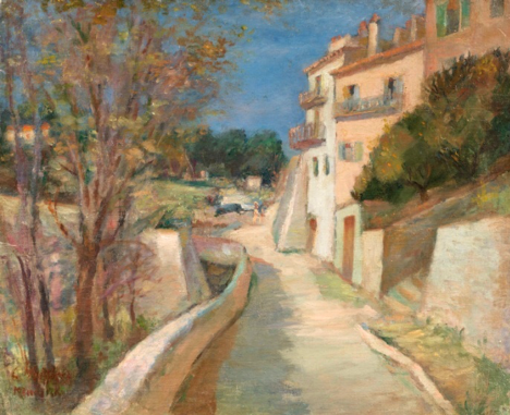 Tableau Saint-Paul-de-Vence, de Léon Weissberg